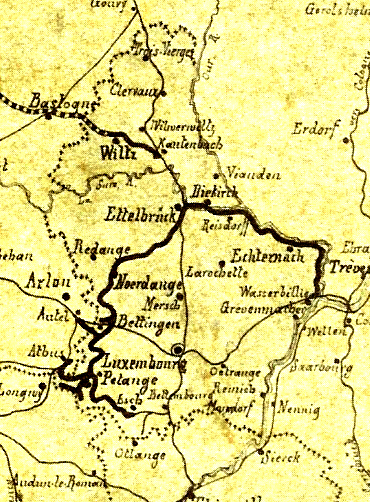 Al Kaart mam fréieren Tracé vun de Prënz-Hary-Strecken Source: Eege Foto an eege Montage vum Ernmuhl